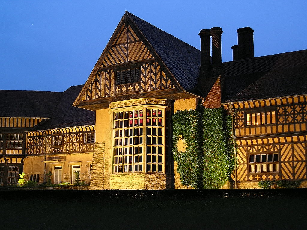 Beleuchtung des Schloss Cecilienhof in Potsdam zu den "Nächtlichen Schlösserimpressionen"